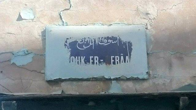 plaque métallique a l"entrée de Souk El ER-EBAÂ